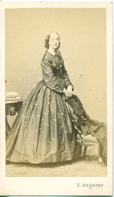 Dona Francisca de Bragança (1824-1898), Princesa de Joinville, irmã de Dom Pedro II.